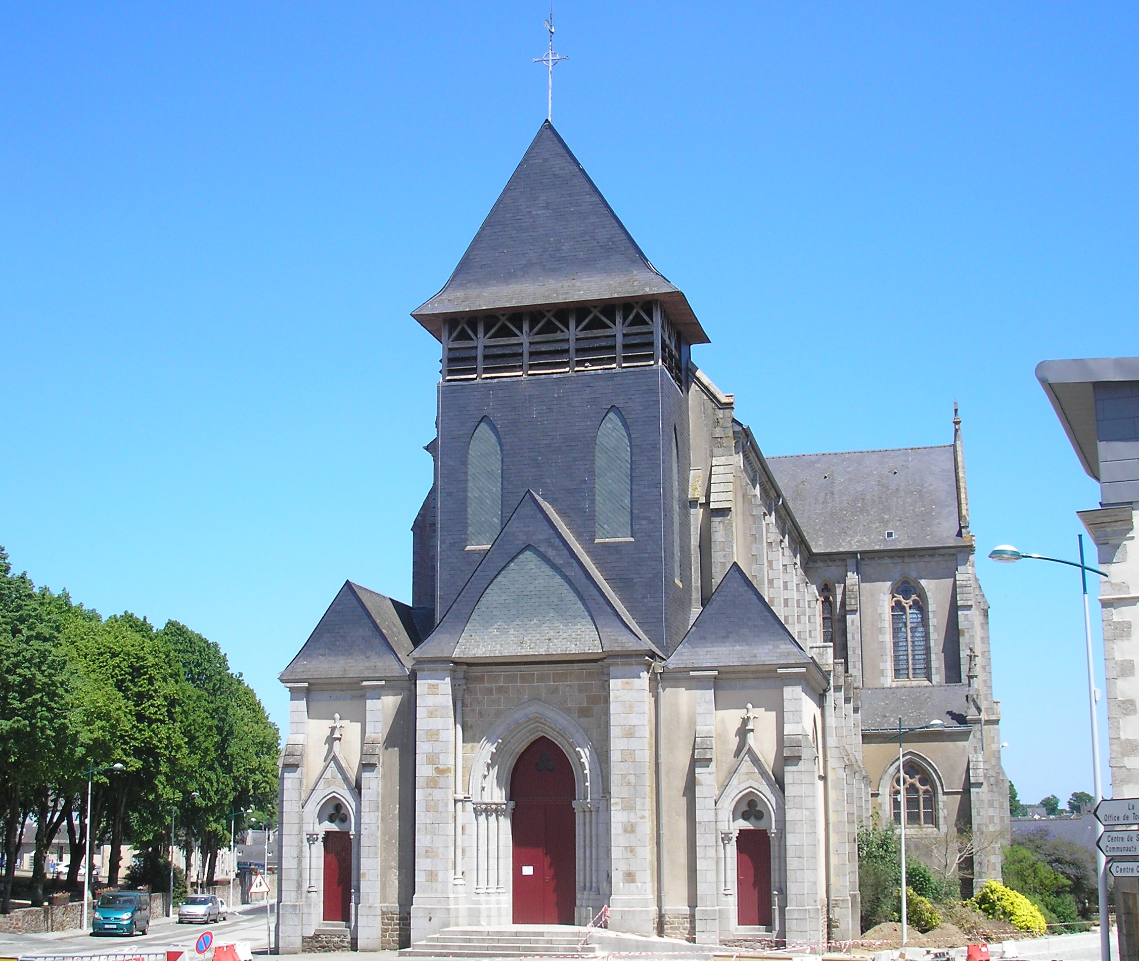 Villaines-la-Juhel (Pays de la Loire, France). L'église Saint-Georges.